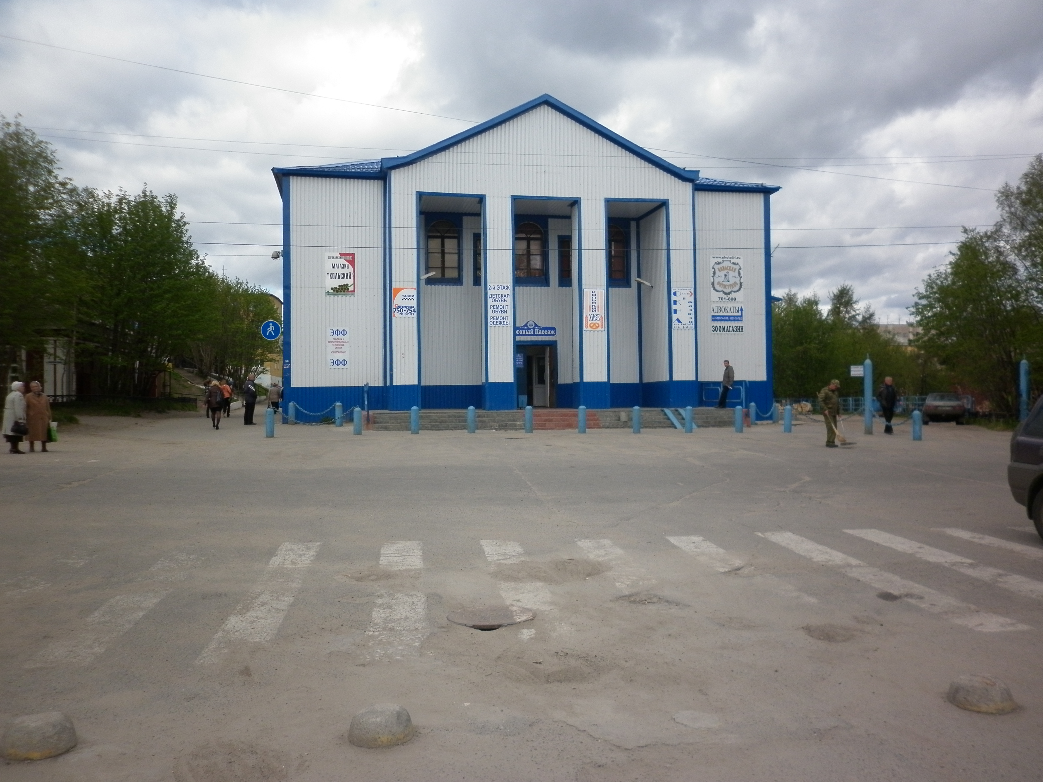 Торговый дом "Пассаж" (Бывший дом Культуры) в центре города Колы.